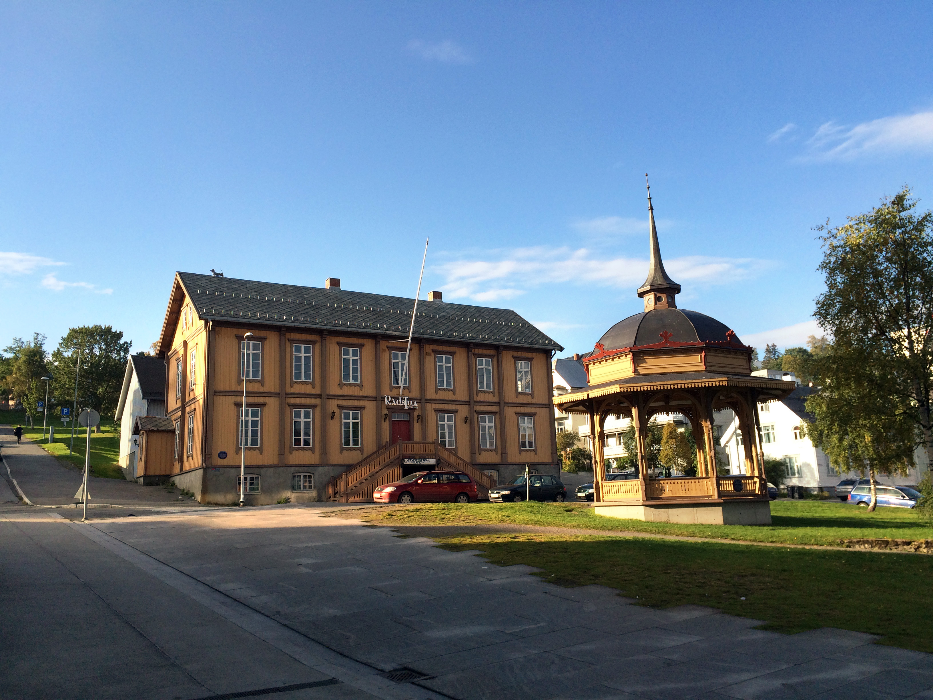 Den gamle rådstua i Tromsø fra 1864.